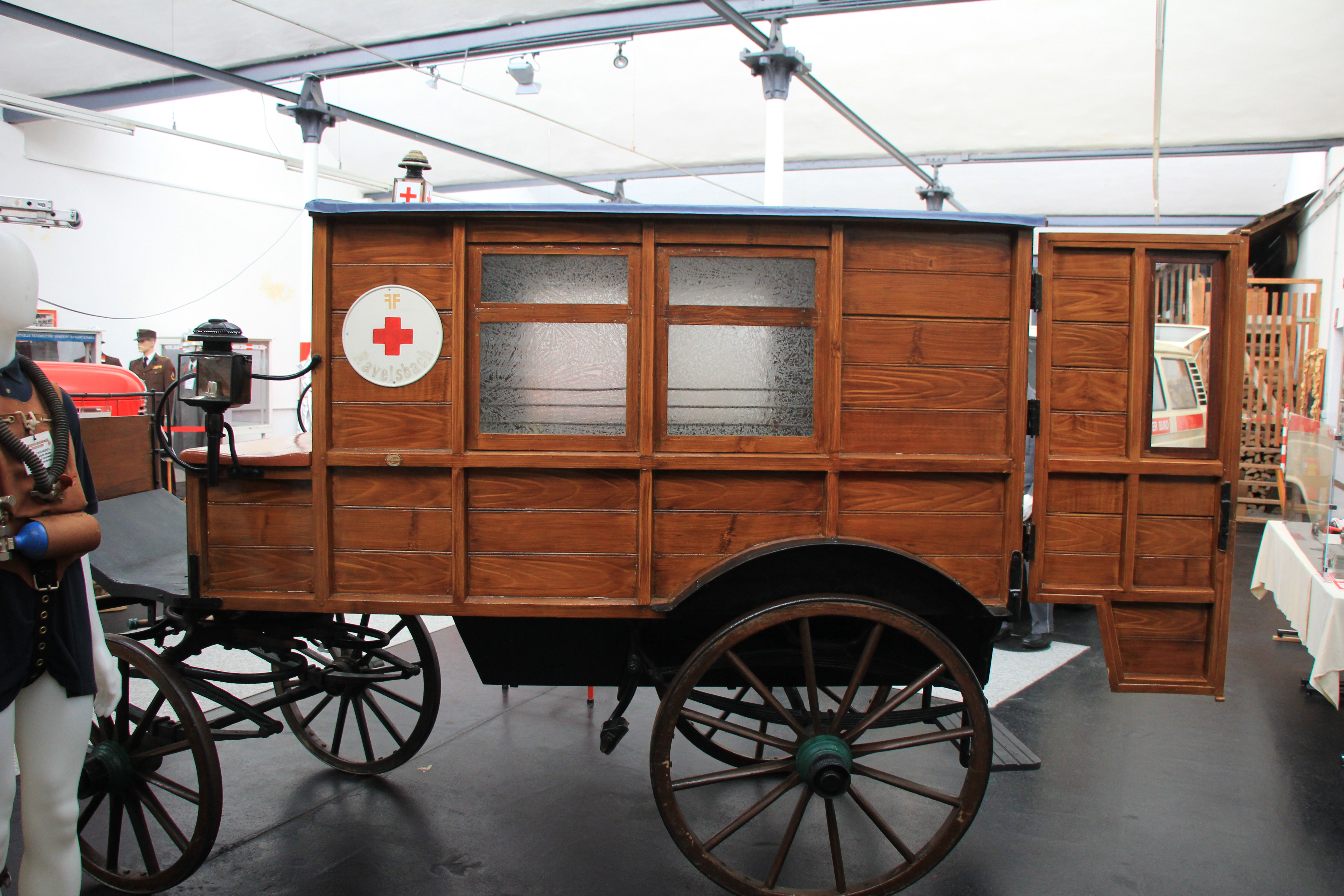 Feuerwehrmuseum innerhalb des Stadtmuseums Traiskirchen